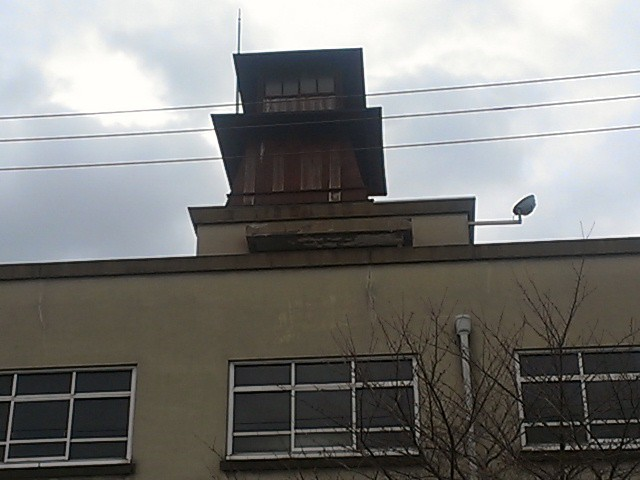 京都市立有済小学校の太鼓望楼。